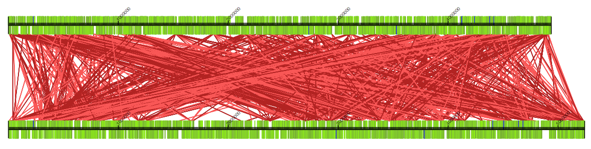 Comparação de sintenia entre genomas usando o método proposto por Diego Mariano.